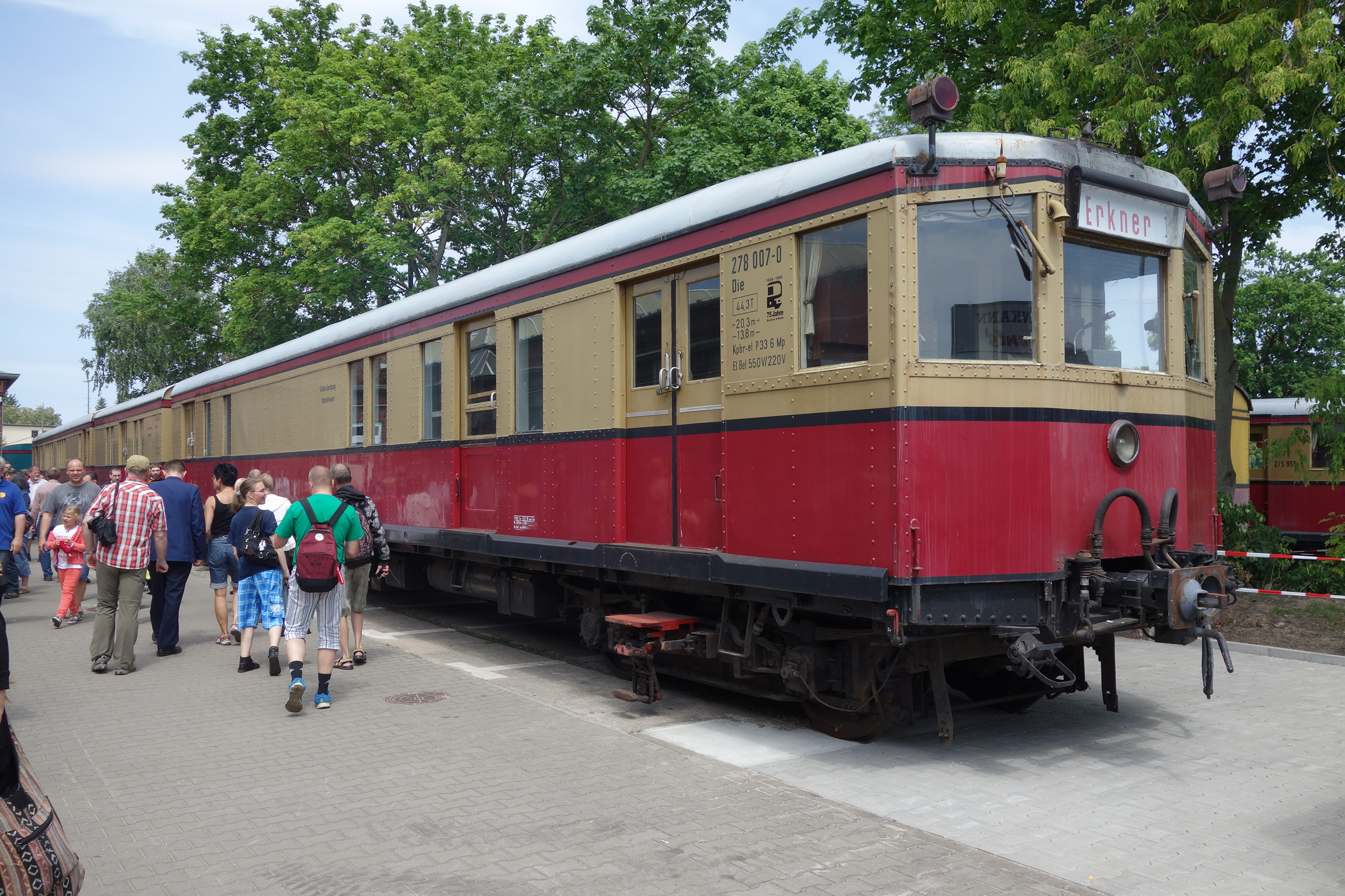 Zum Hilfsgerätezug umgebauter ET 169 neben der Triebwagenhalle Erkner der S-Bahn Berlin